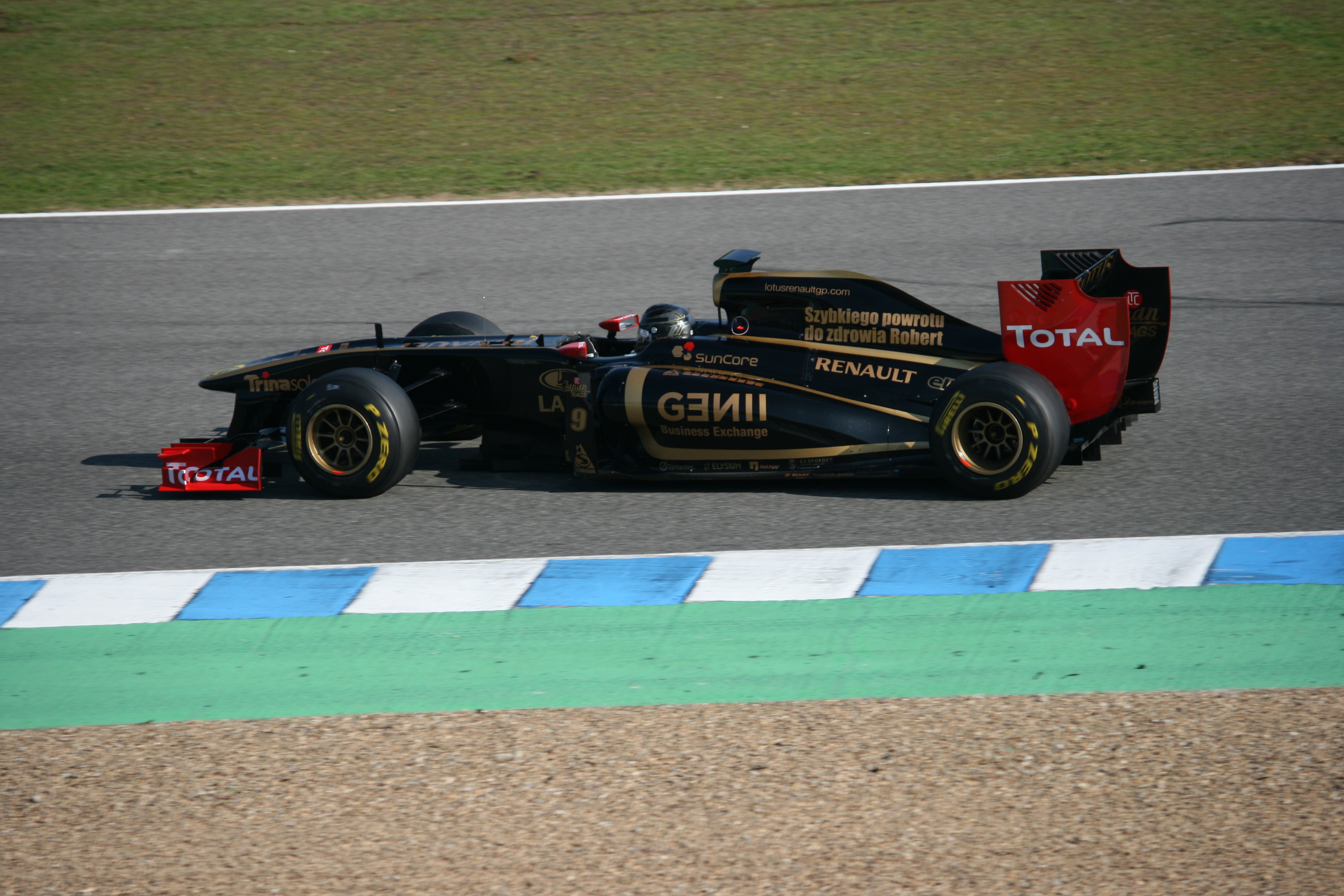 Nick Heidfeld